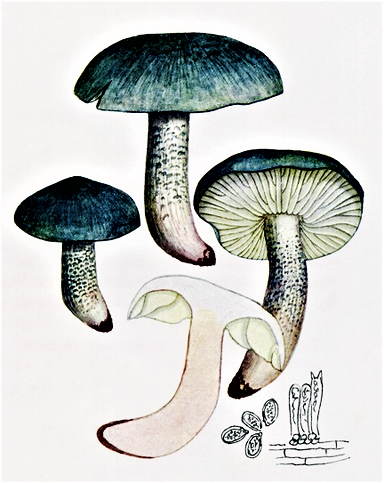 Giacomo Bresadola: Tricholoma saponaceum (Fr., 1818) P.Kumm. (1871)